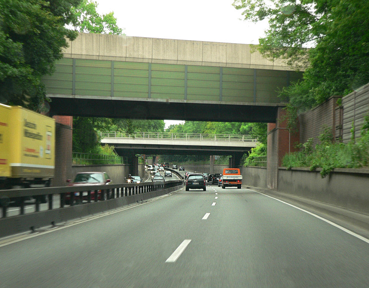 Südschnellweg